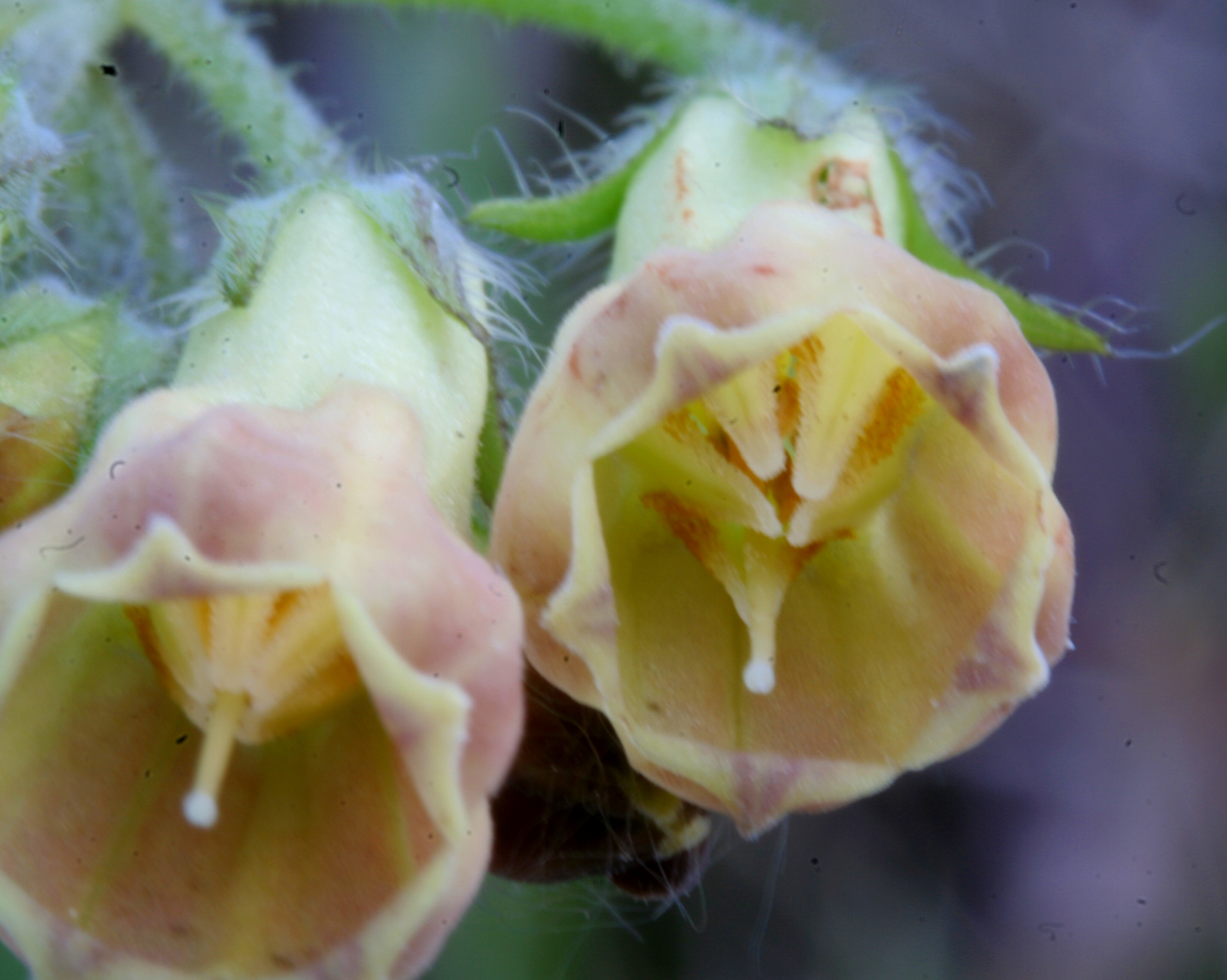 Symphytum_officinale (Consolida maggiore) Località Val Piana, Limana (BL), 850 m s.l.m.